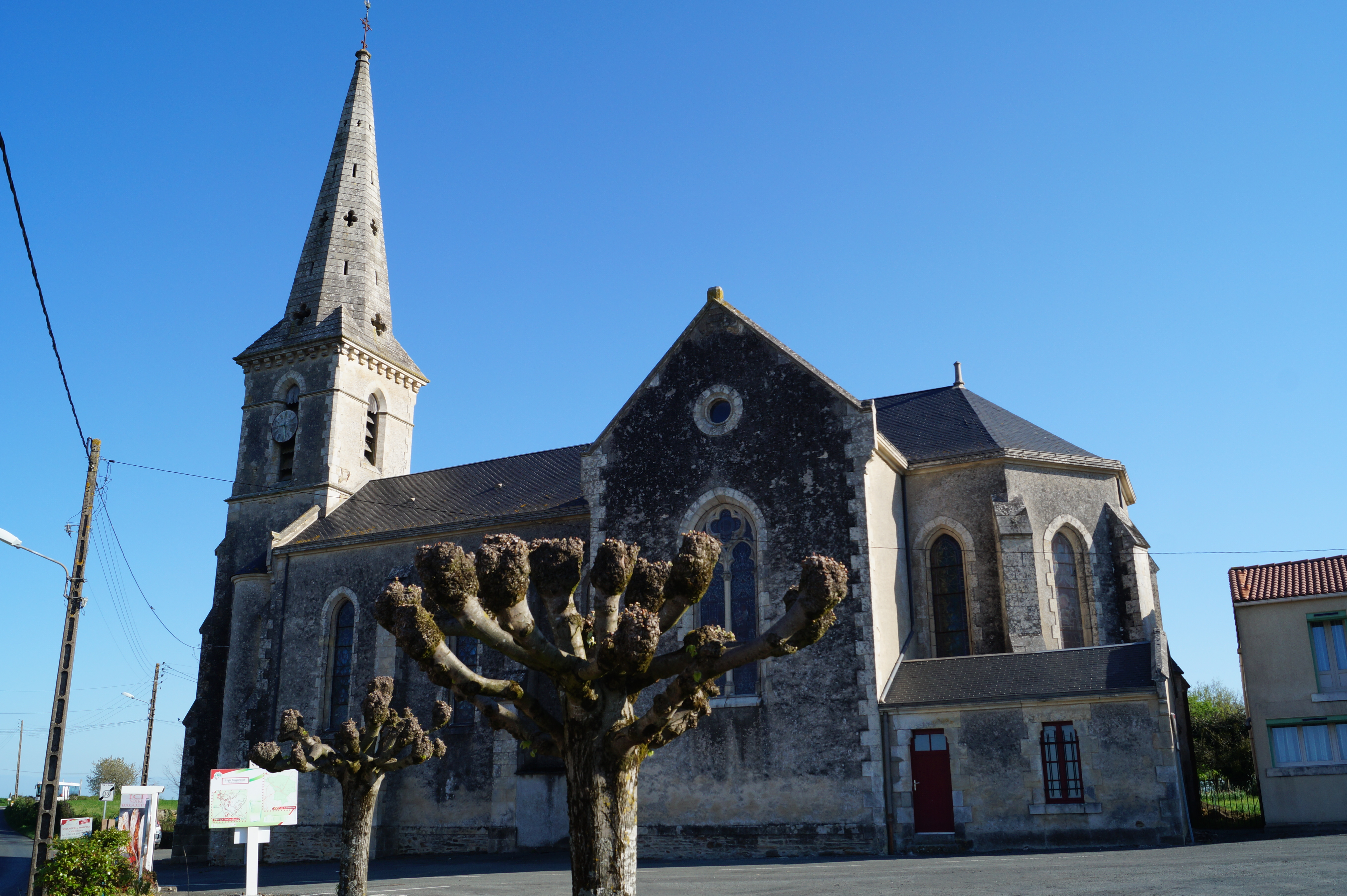 L’église Saint-Gilles de Loge-Fougereuse depuis la rue de la Cure.